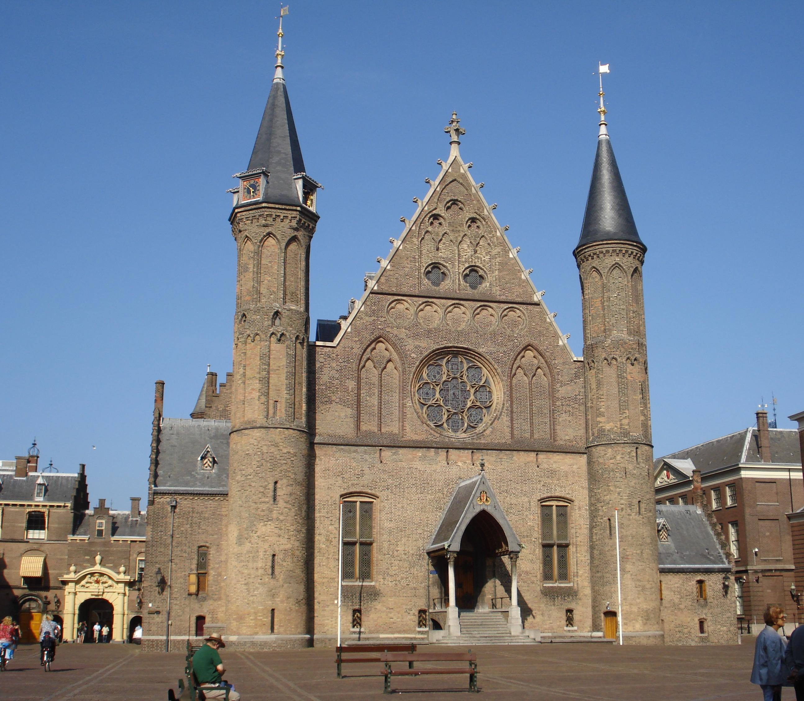 Den Haag, Binnenhof, Ridderzaal.